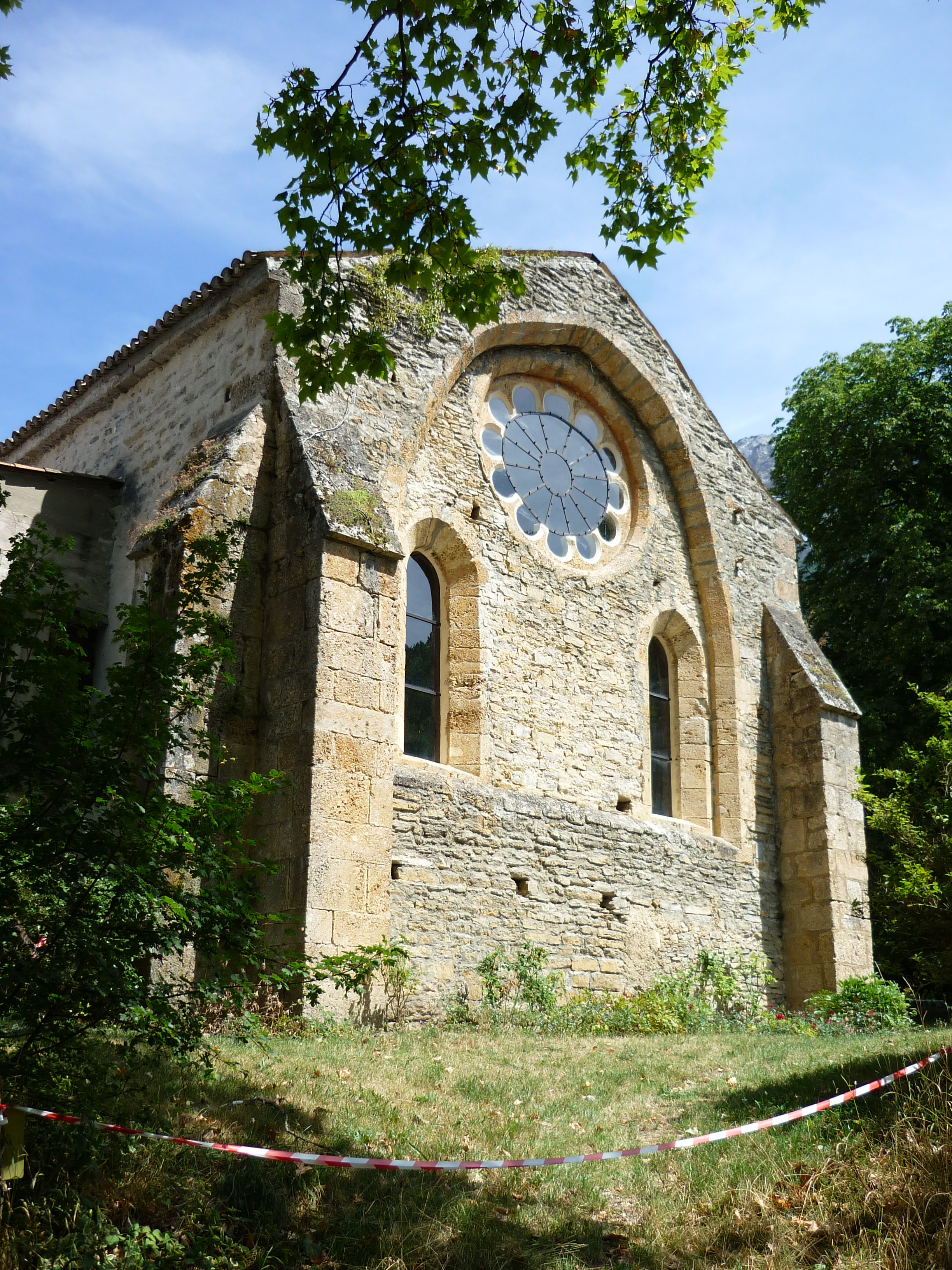 Kloster Valcroissant, Südfront des Refektoriums